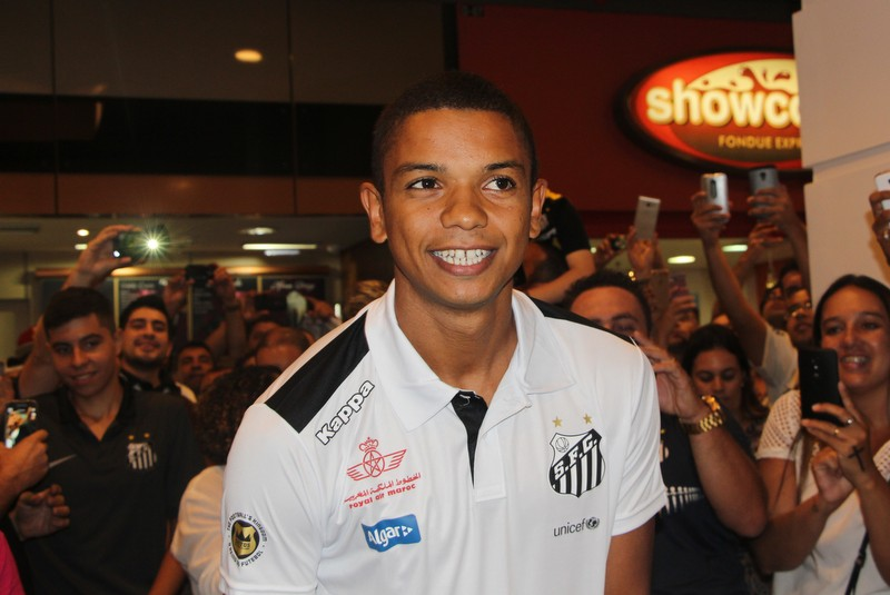 David BRaz-004